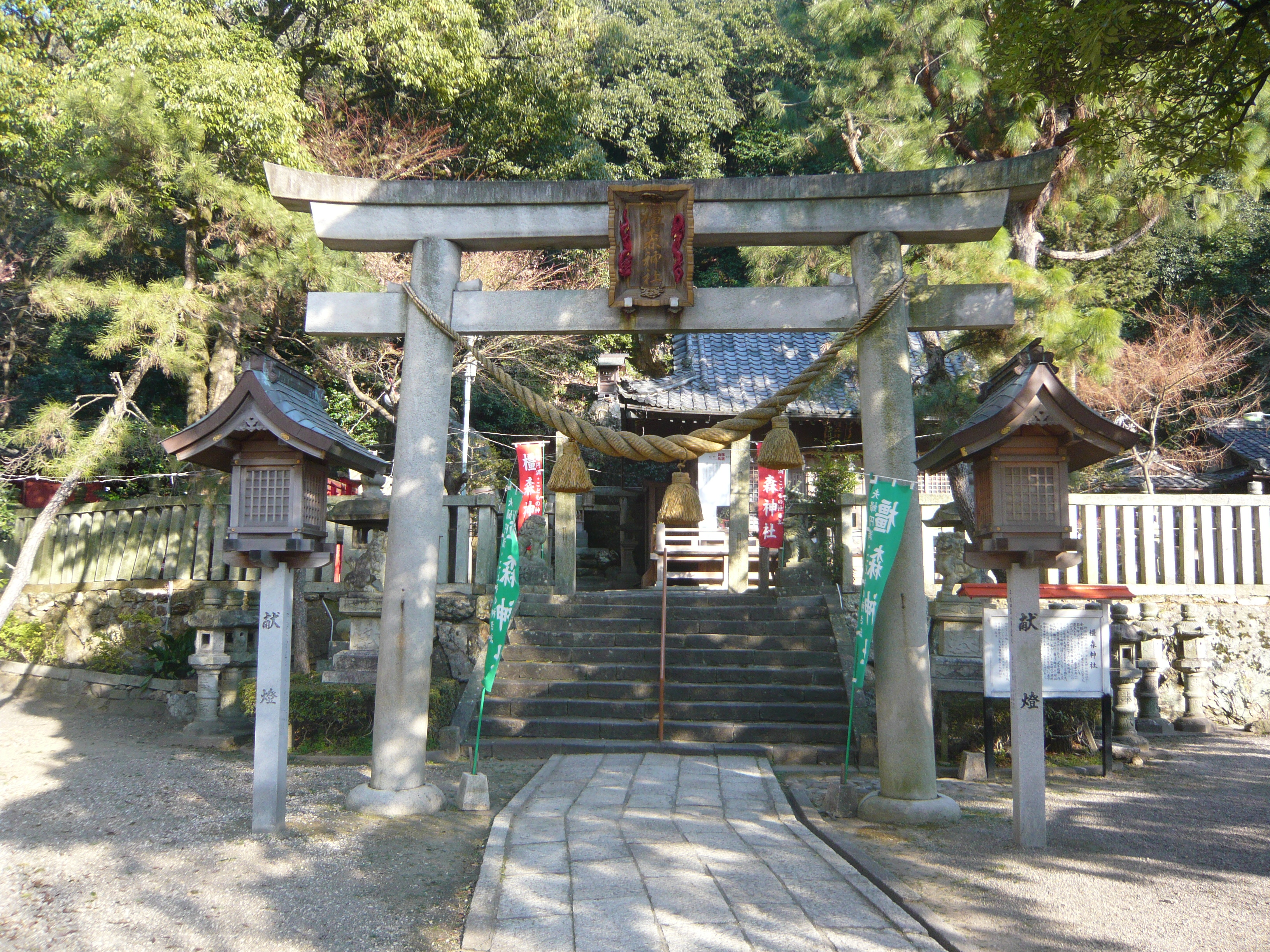 Kashimori Shrine（橿森神社）,Gifu,Gifu,Japan（岐阜県岐阜市）で撮影。